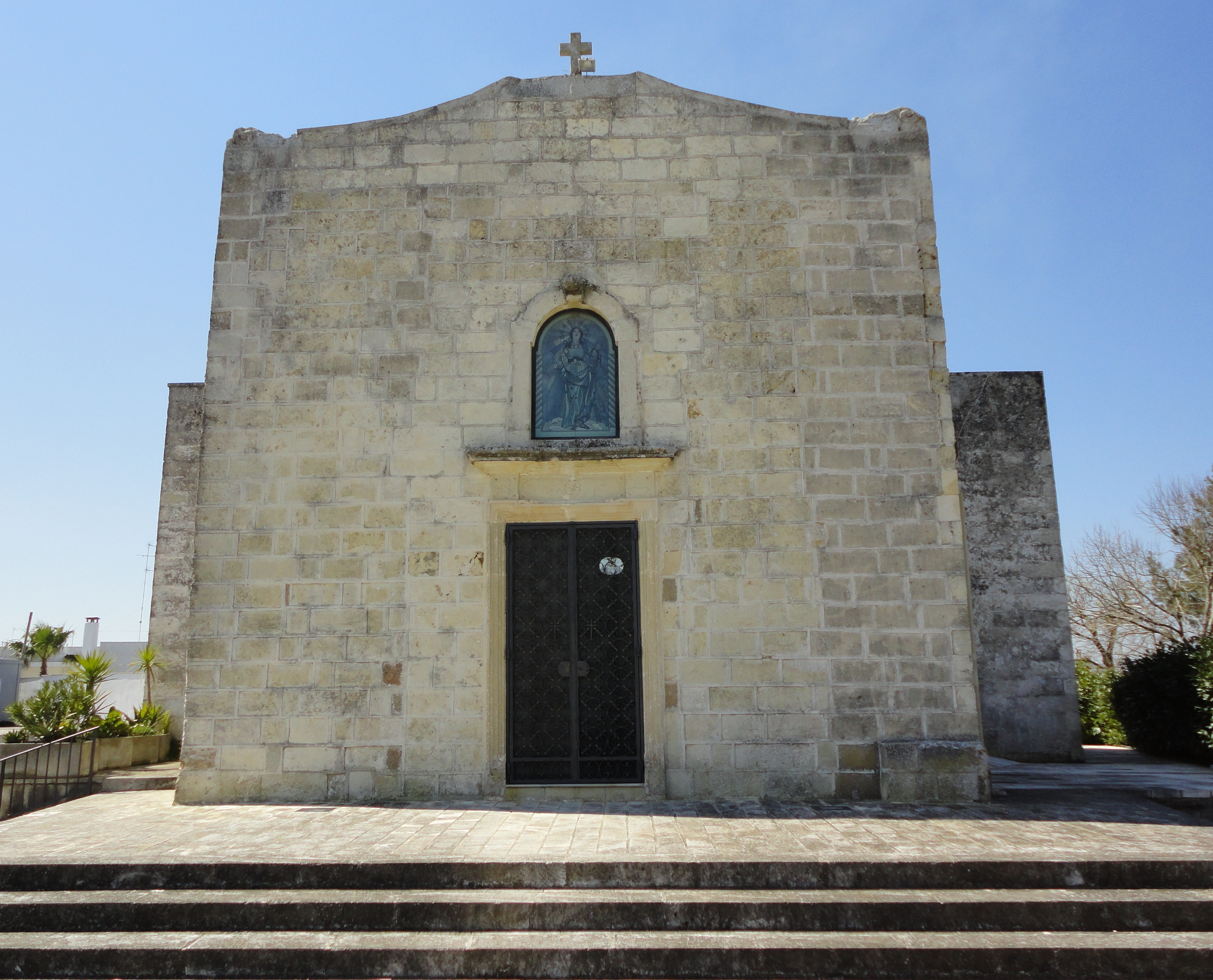 Chiesa dell'Assunta Cocumola, Lecce